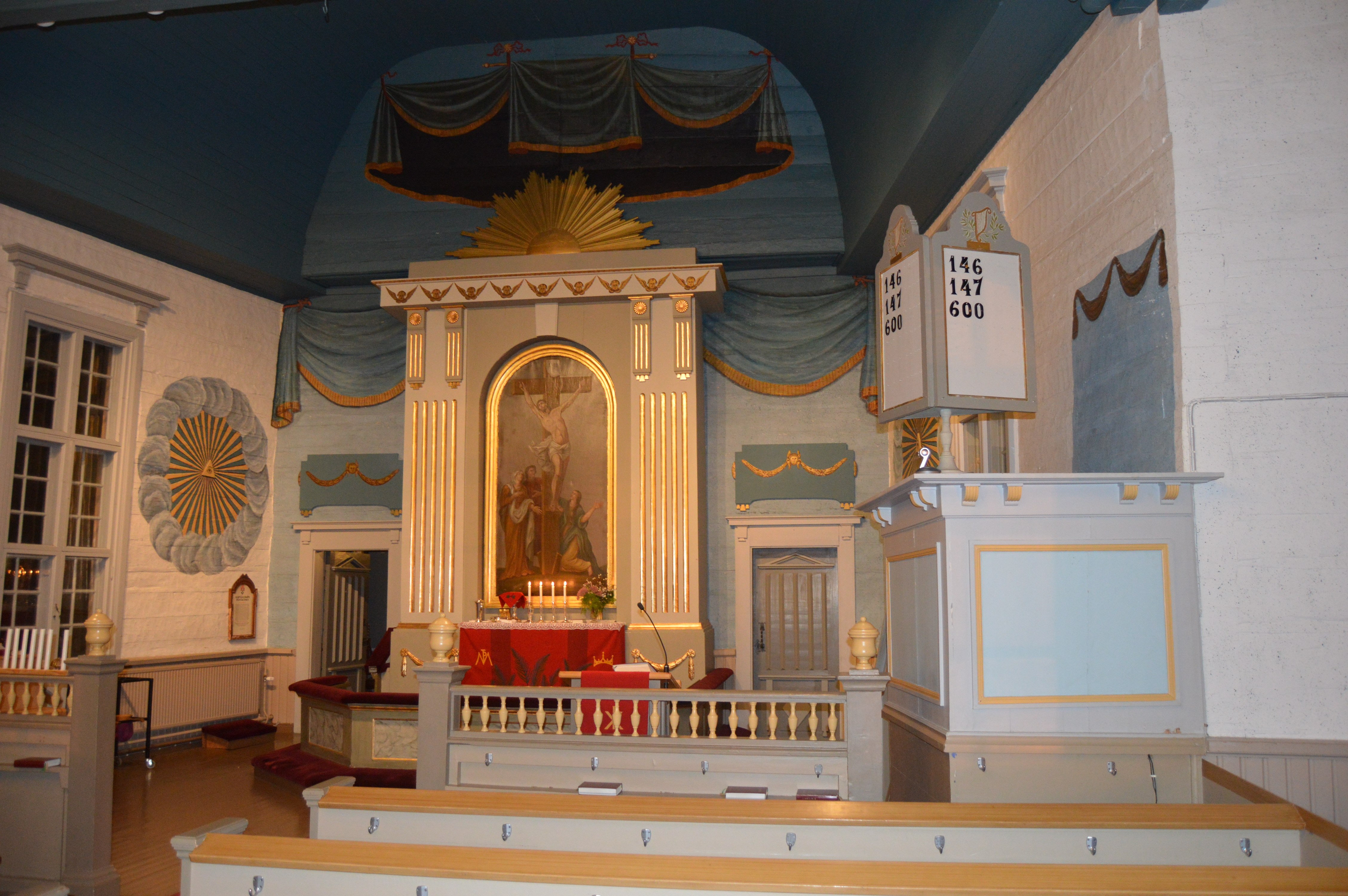 Joensuun Kiihtelysvaaran kirkon alttari